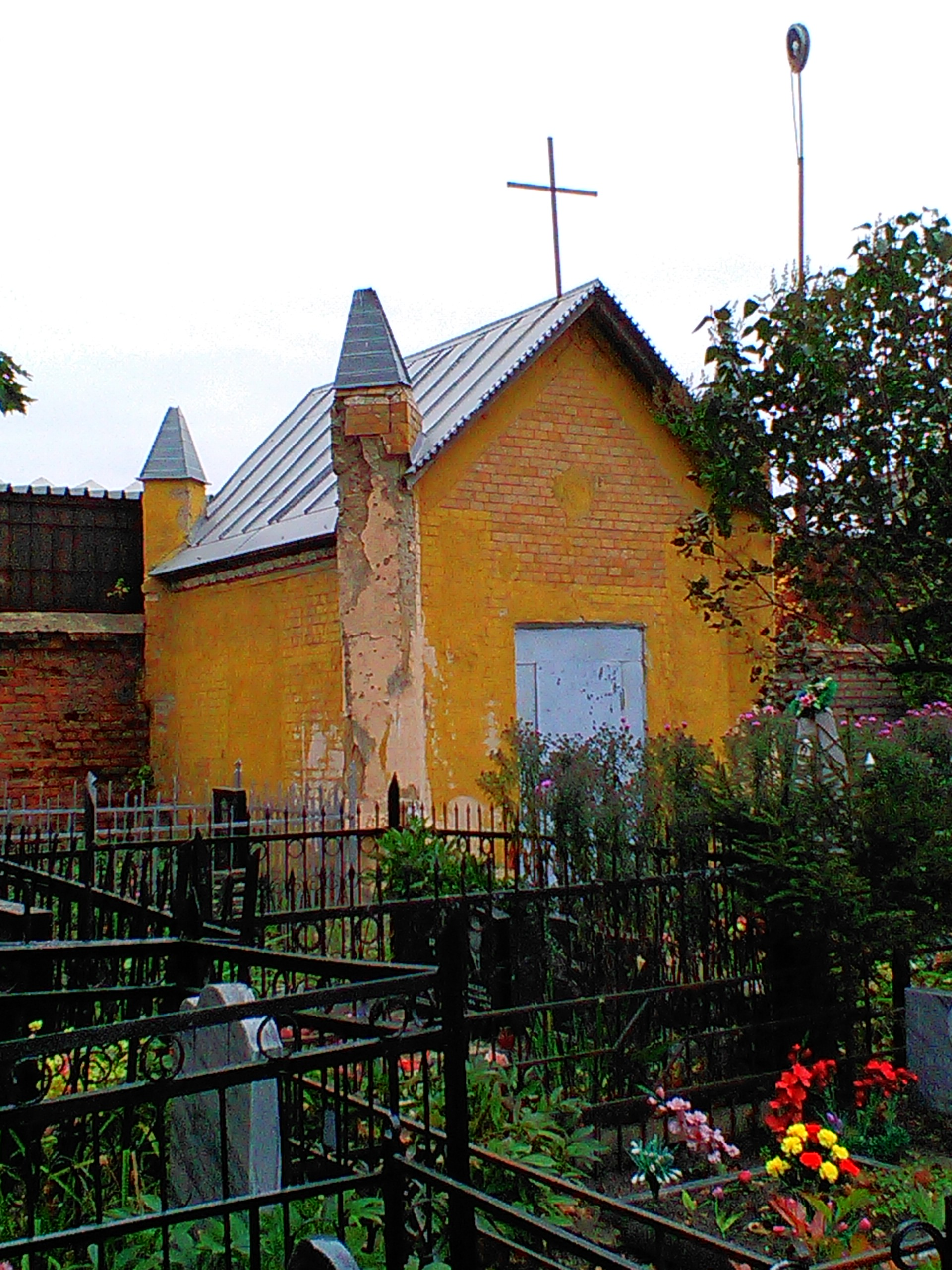 Протестантская часовня на Троицком кладбище